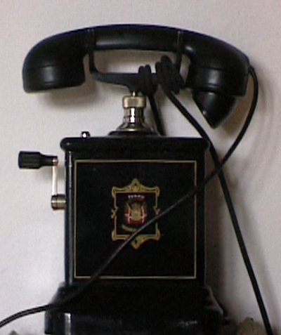 Telefon fra omkring 1950 uden nummerskive